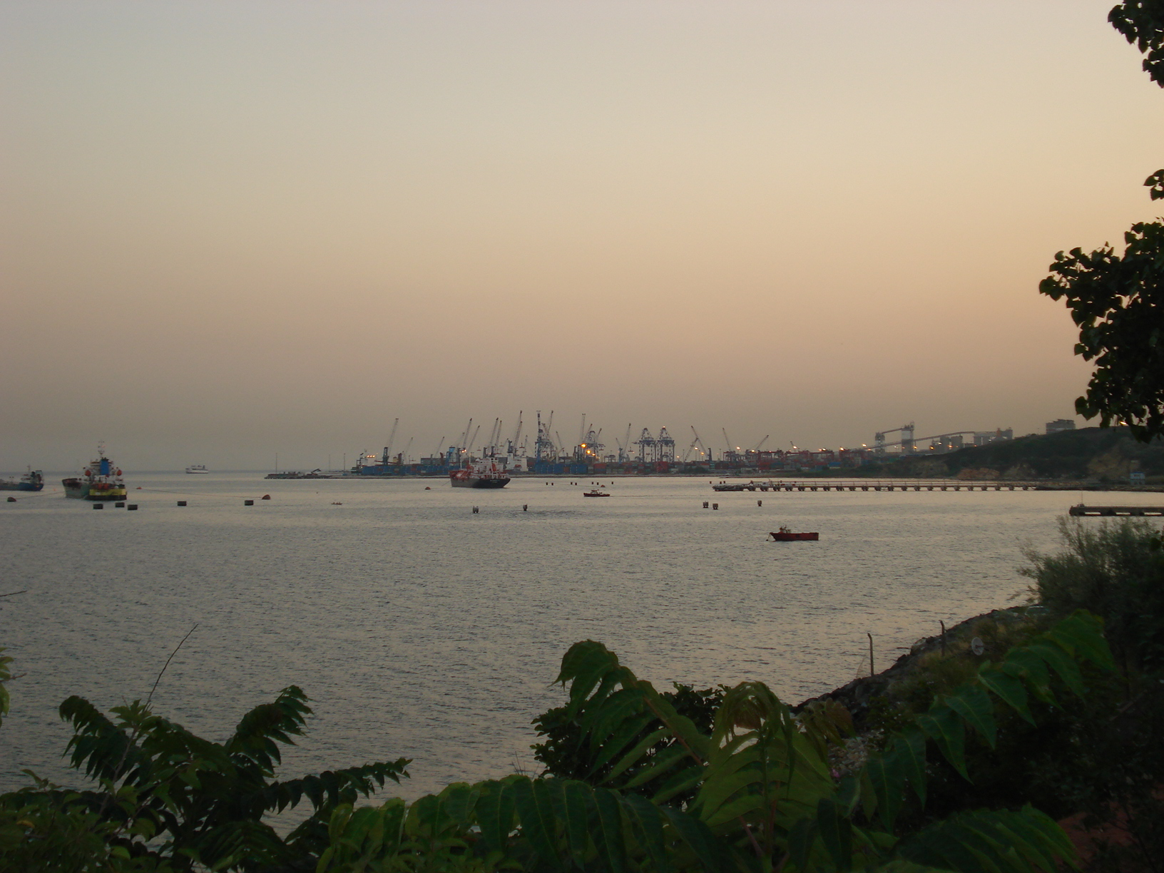 Ambarlı Port in Yakuplu, Büyükçekmece, İstanbul from seaside in Avcılar